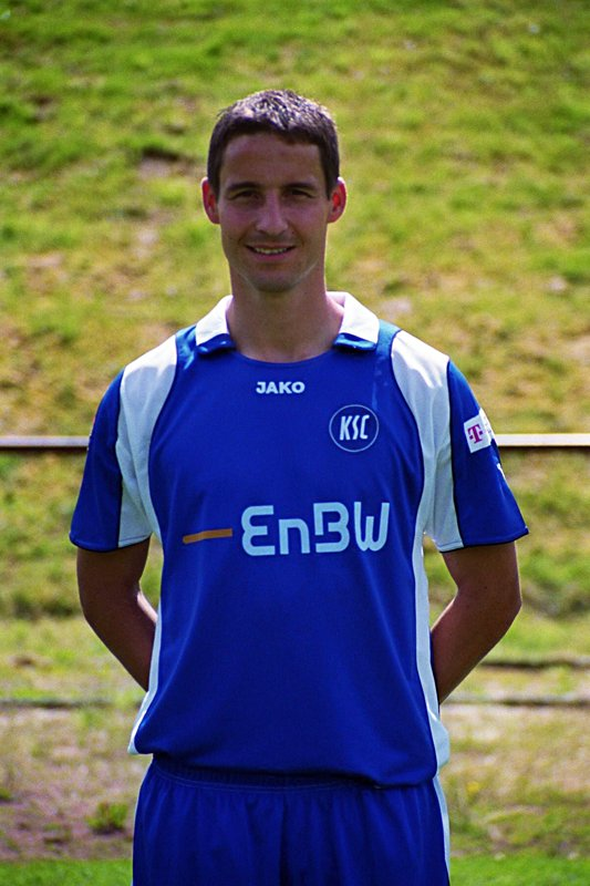 Martin Stoll